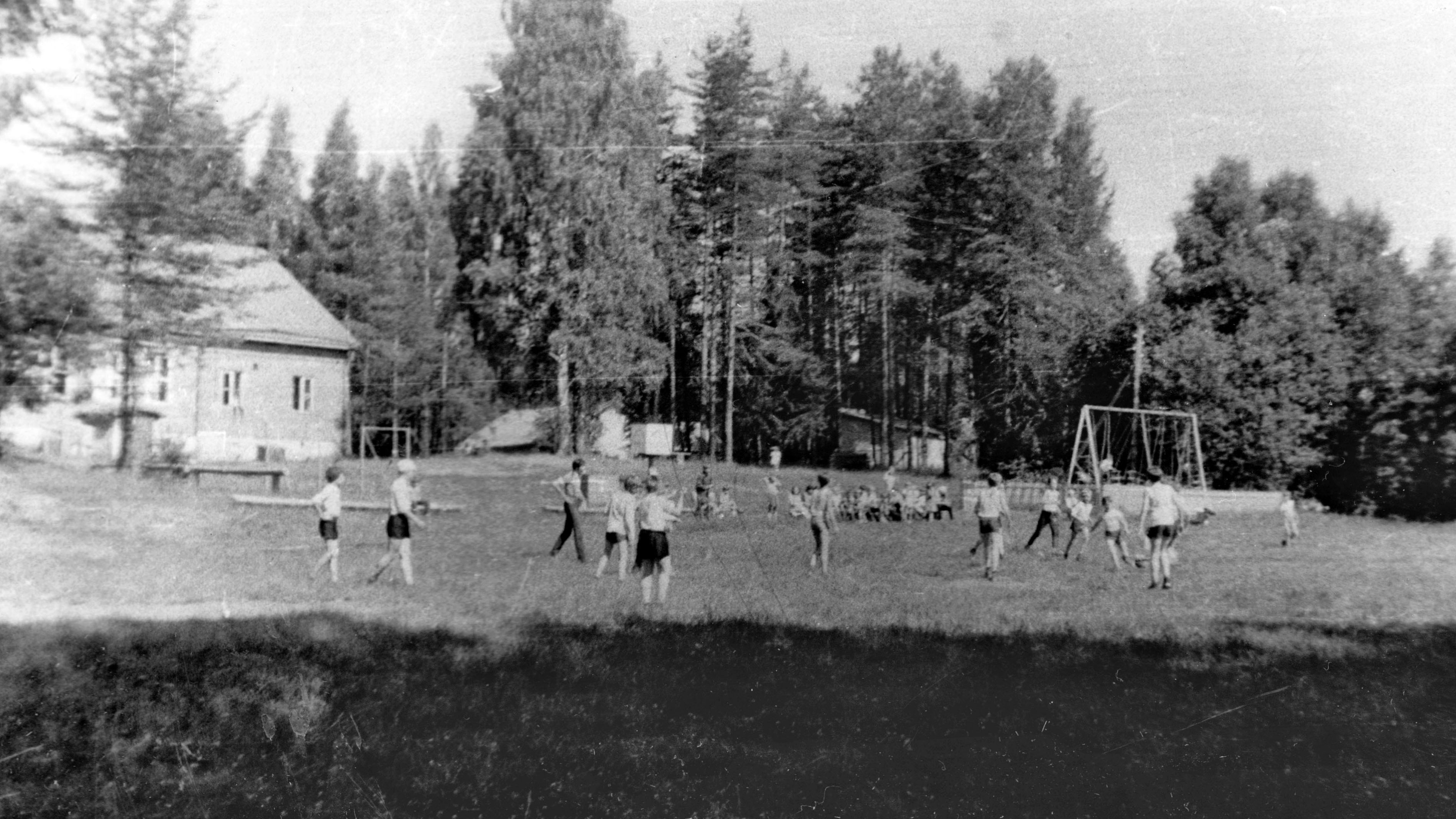 Пионерлагерь «Дружба», Хямекоски. 1970-е годы. Фотография из семейного альбома.